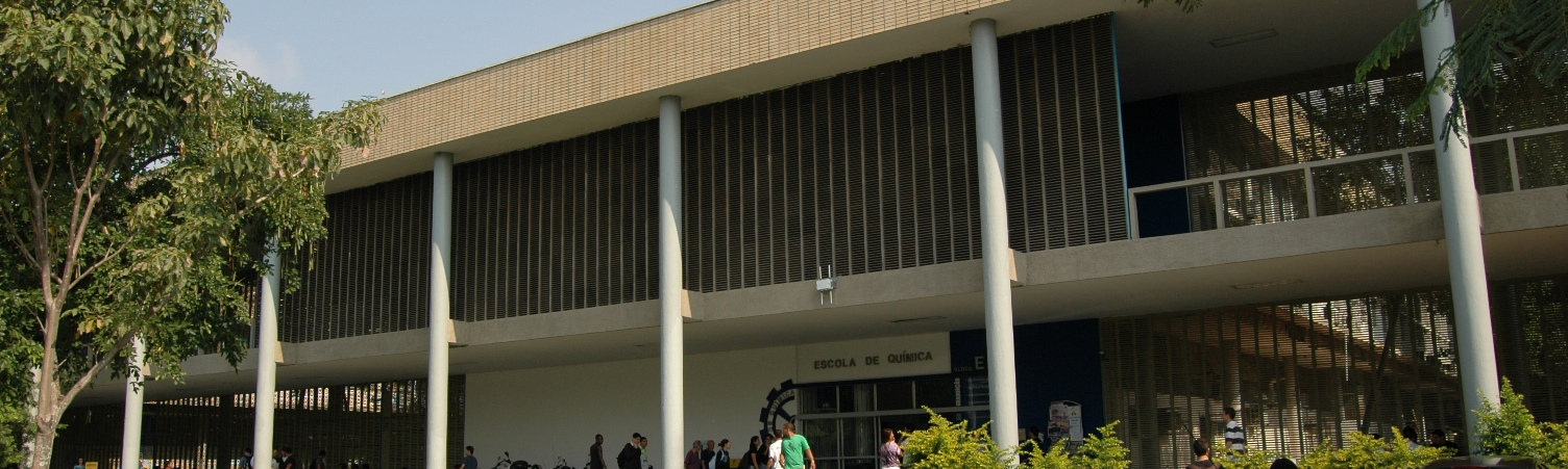 Foto da Escola de Química da UFRJ. A imagem é uma obra derivada de: Foi feito corte superior e inferior.